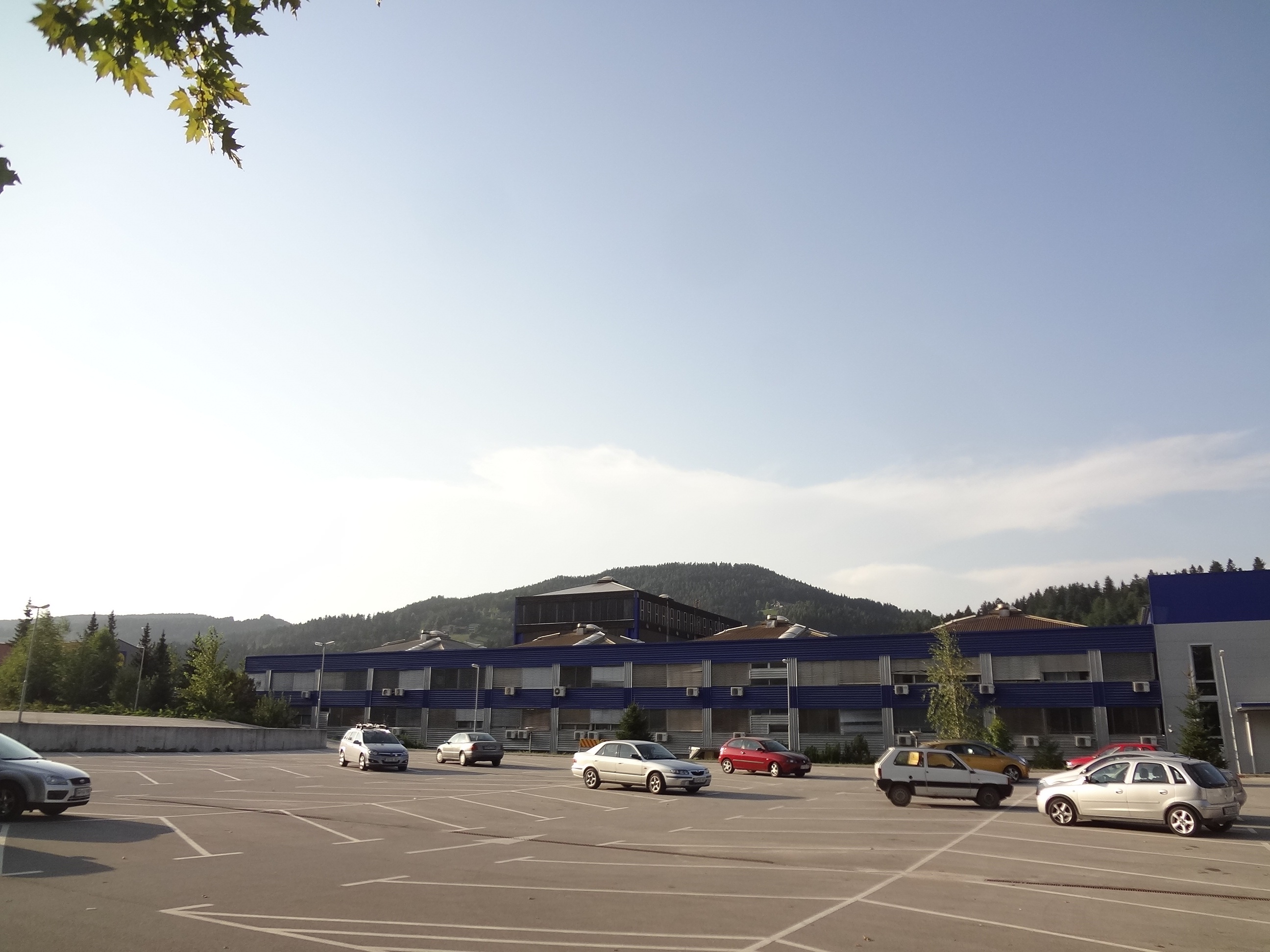 Poslovna cona v Dobji vasi